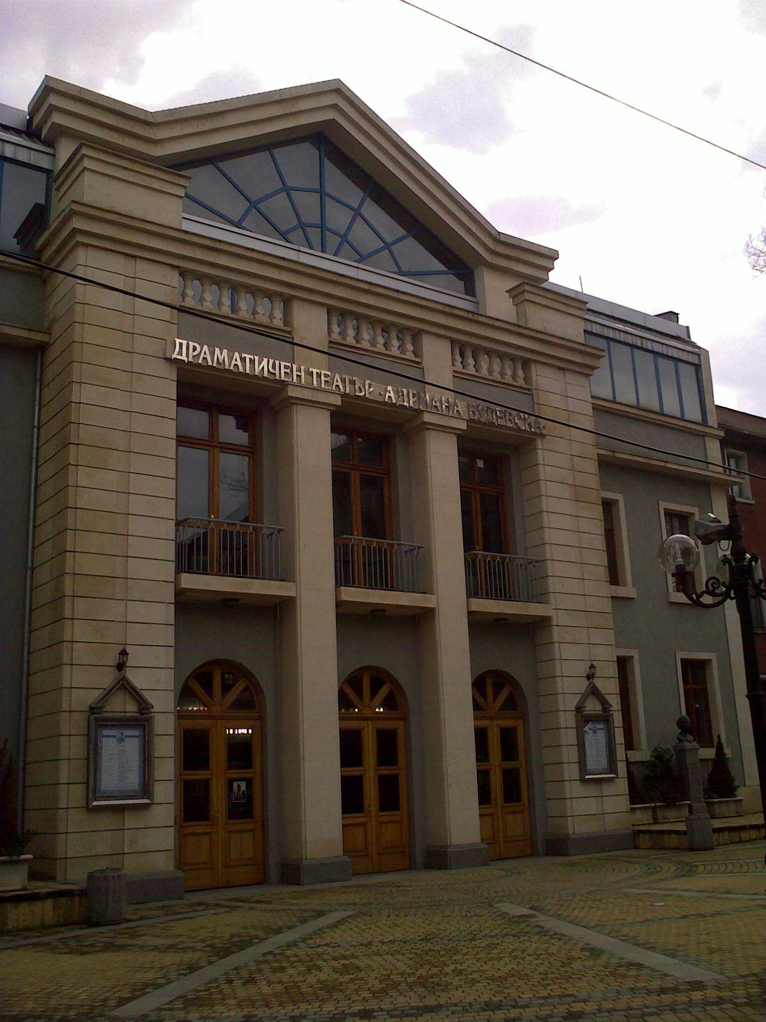 Драматичен театър "Адриана Будевска" в Бургас